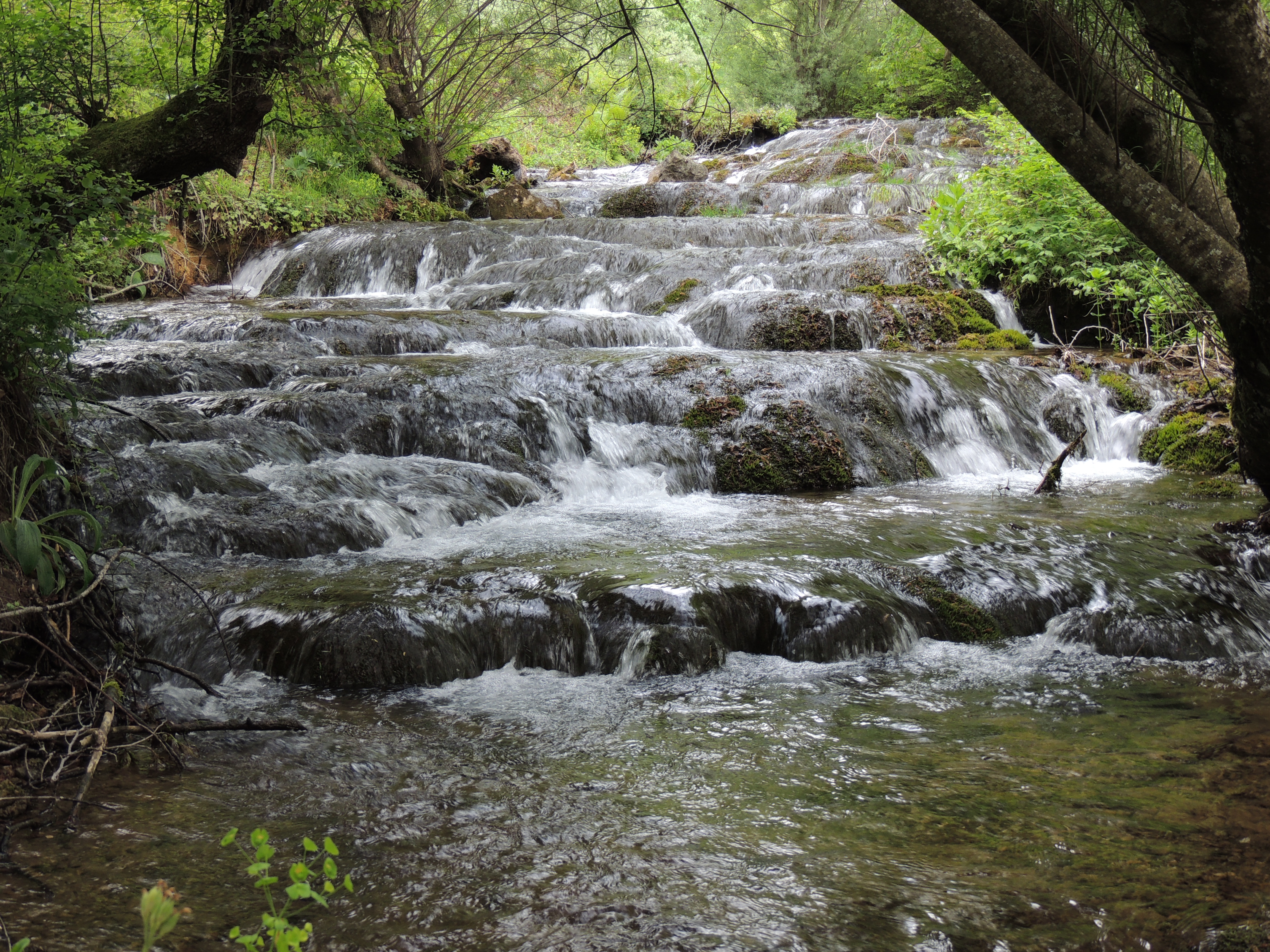 Kaskade Sopotnice Ово је фотографија заштићеног природног добра у Србији под шифром: СП216This is a a photo of a natural area in Serbia with ID: СП216